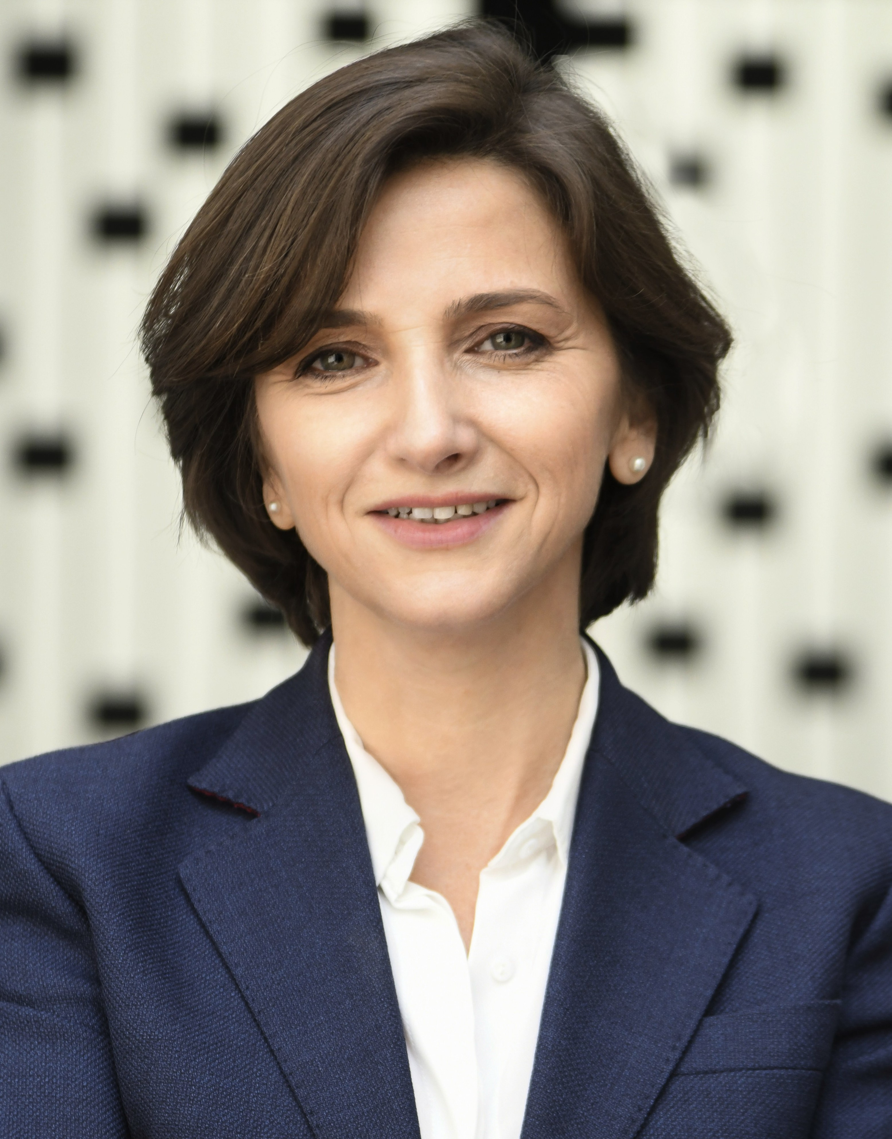 portrait de Nathalie Avy-Elimas